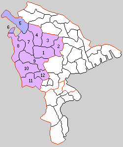 都筑郡の町村。